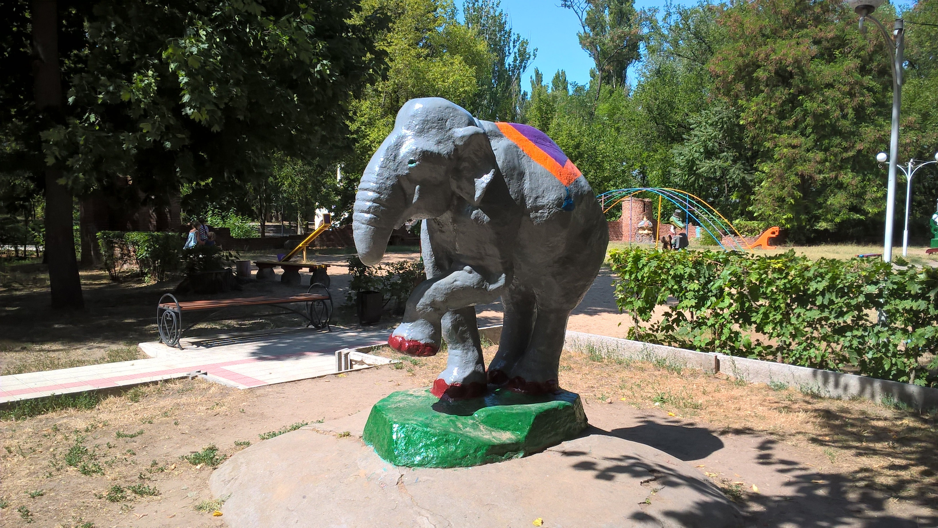 Відомий Слоник на дитмайданчику у Новій Каховці